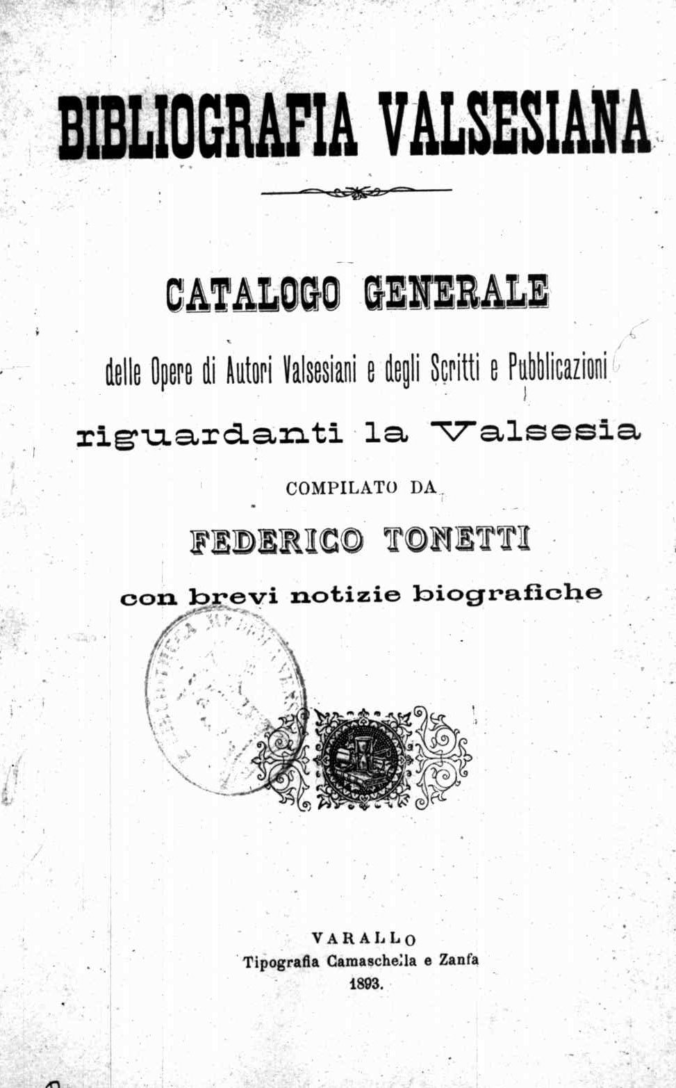 Frontespizio